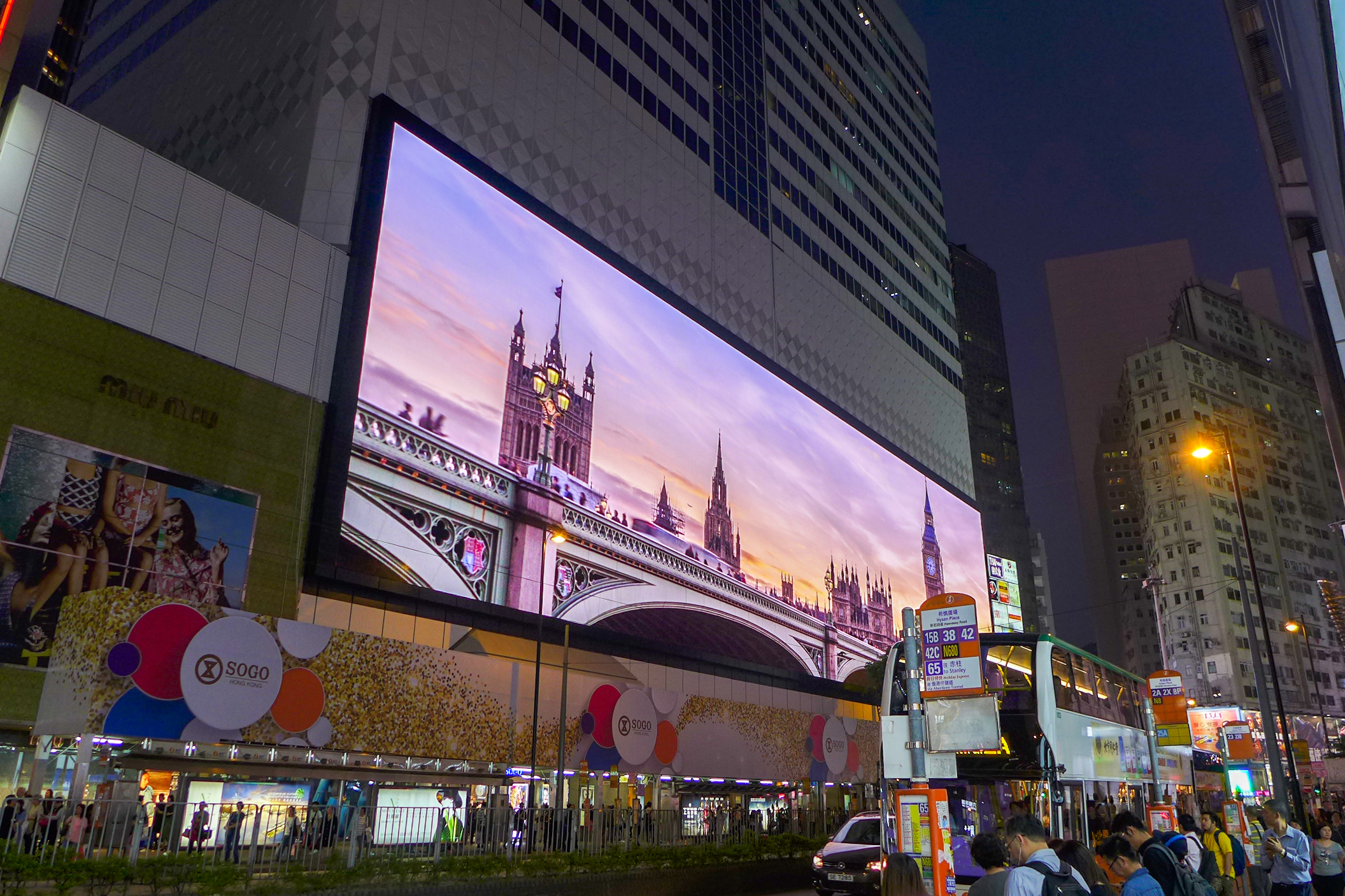 SOGO LED TV demo play